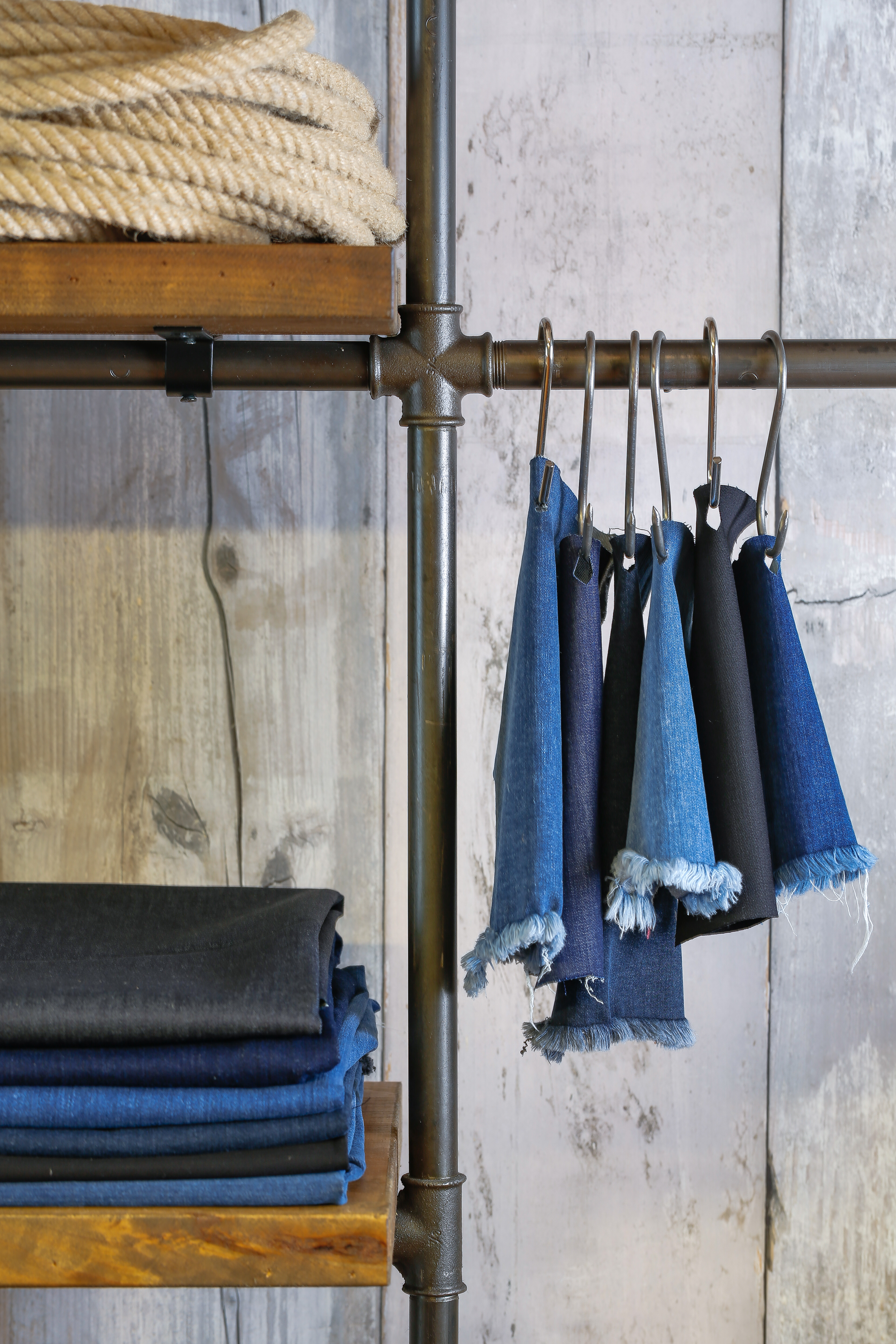 ISKO produceert als grootste denimbedrijf jaarlijks vele unieke stoffen